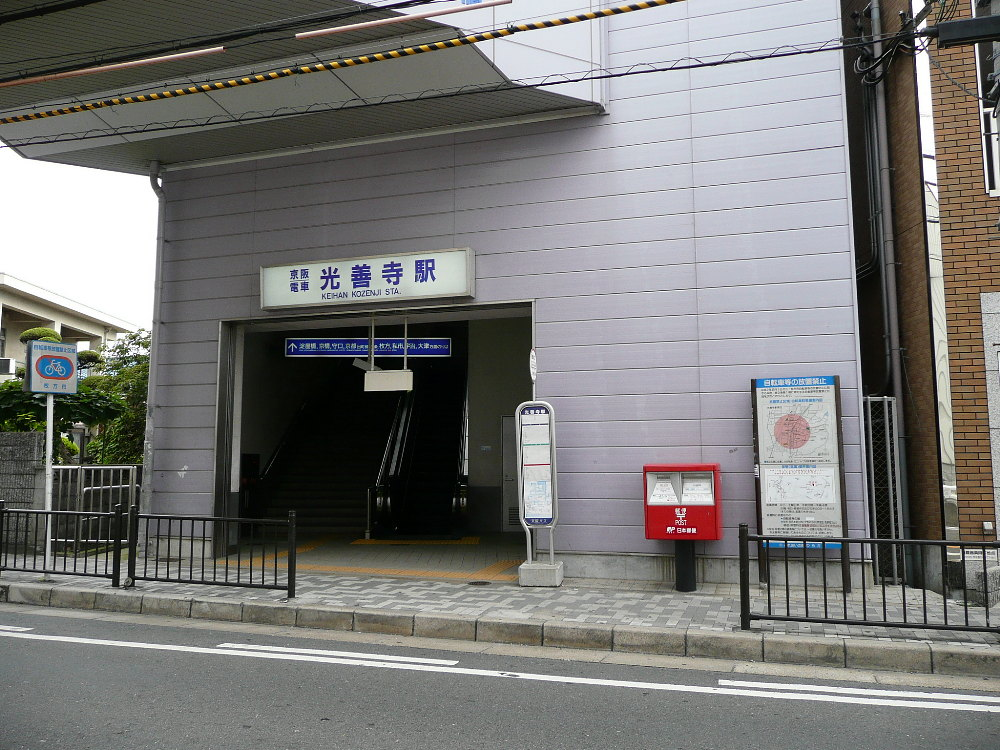 京阪電気鉄道ja:京阪本線ja:光善寺駅東口